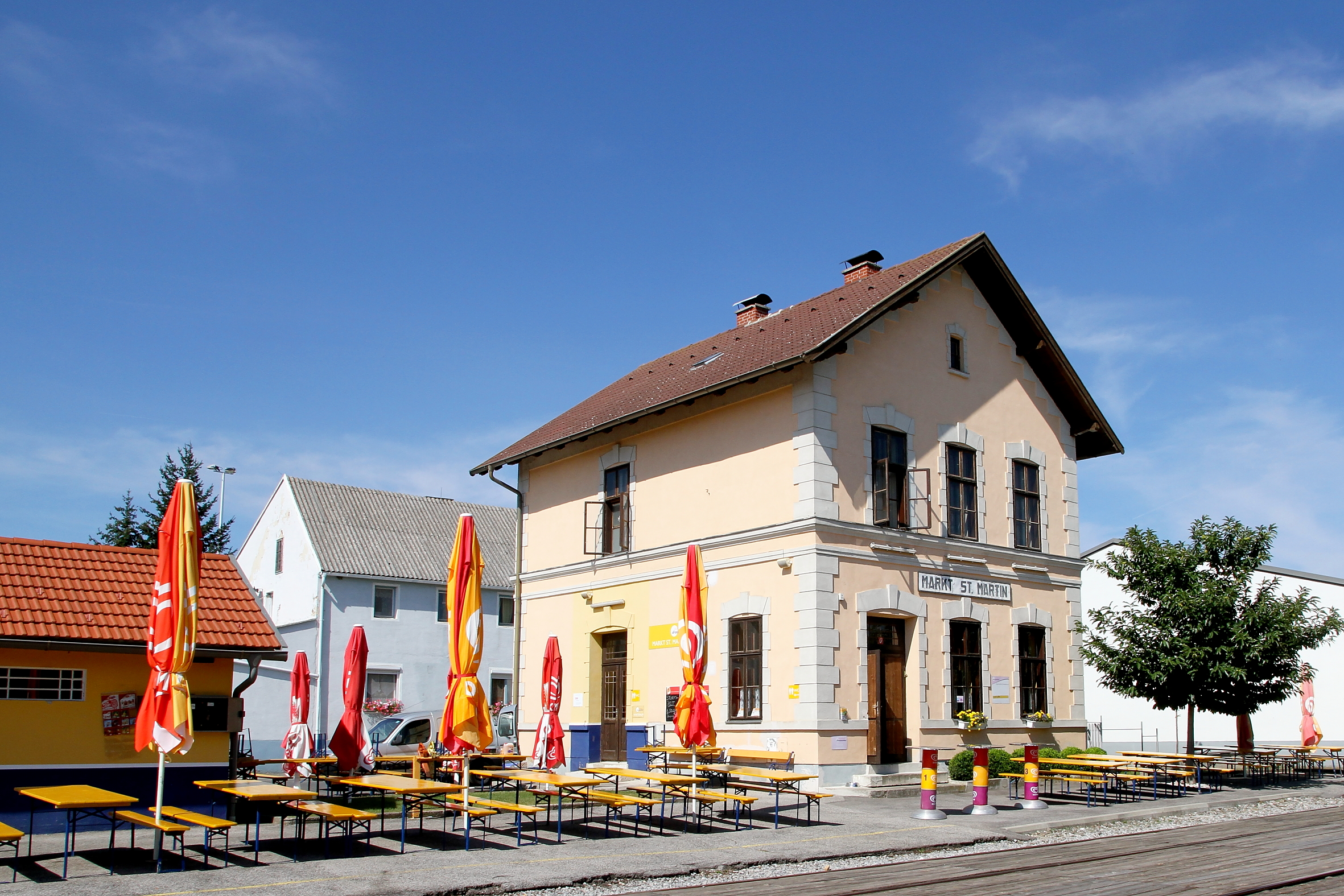 Der denkmalgeschützte Bahnhof in Markt St. Martin der Burgenlandbahn.